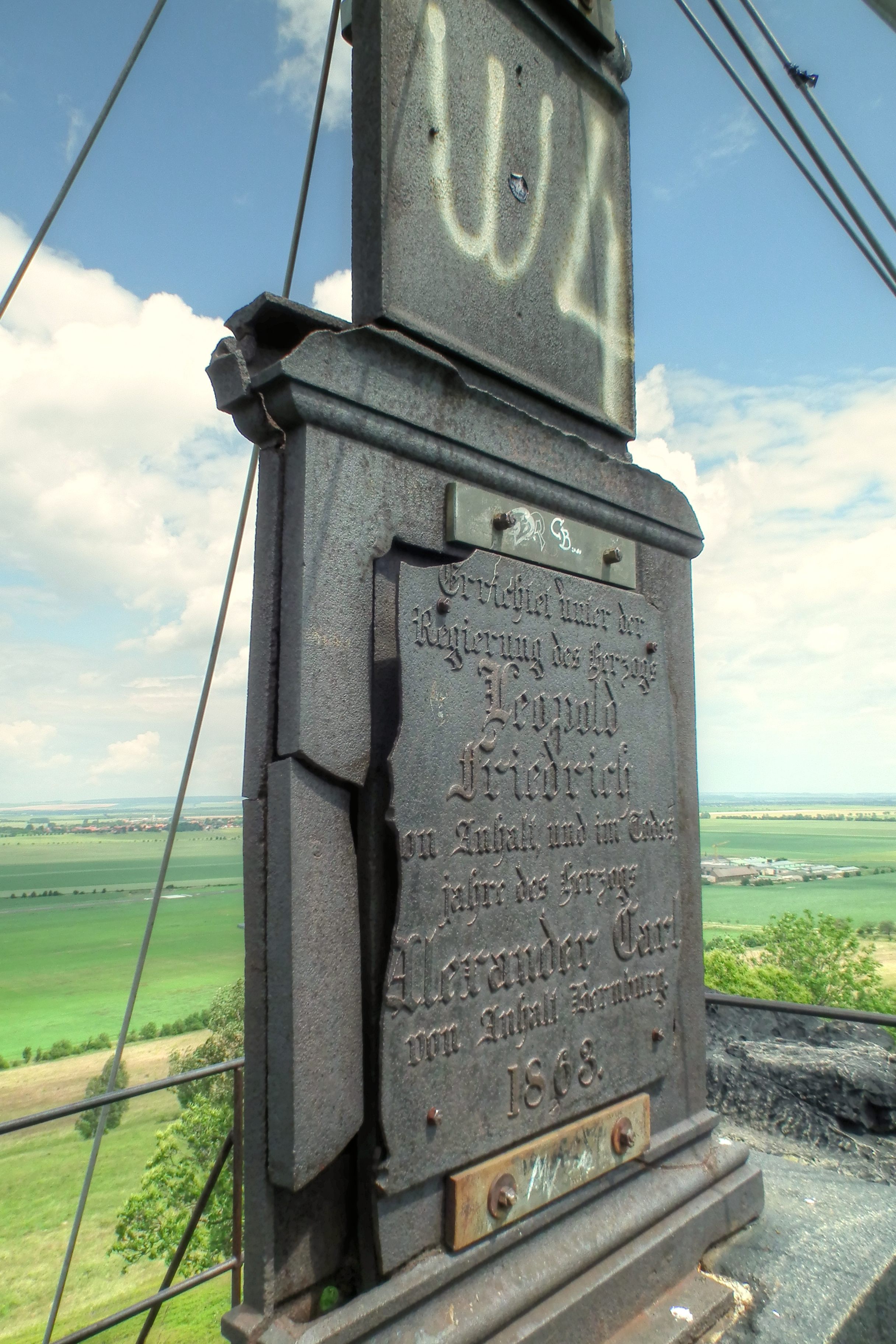 Denkmal auf dem Großen Gegenstein